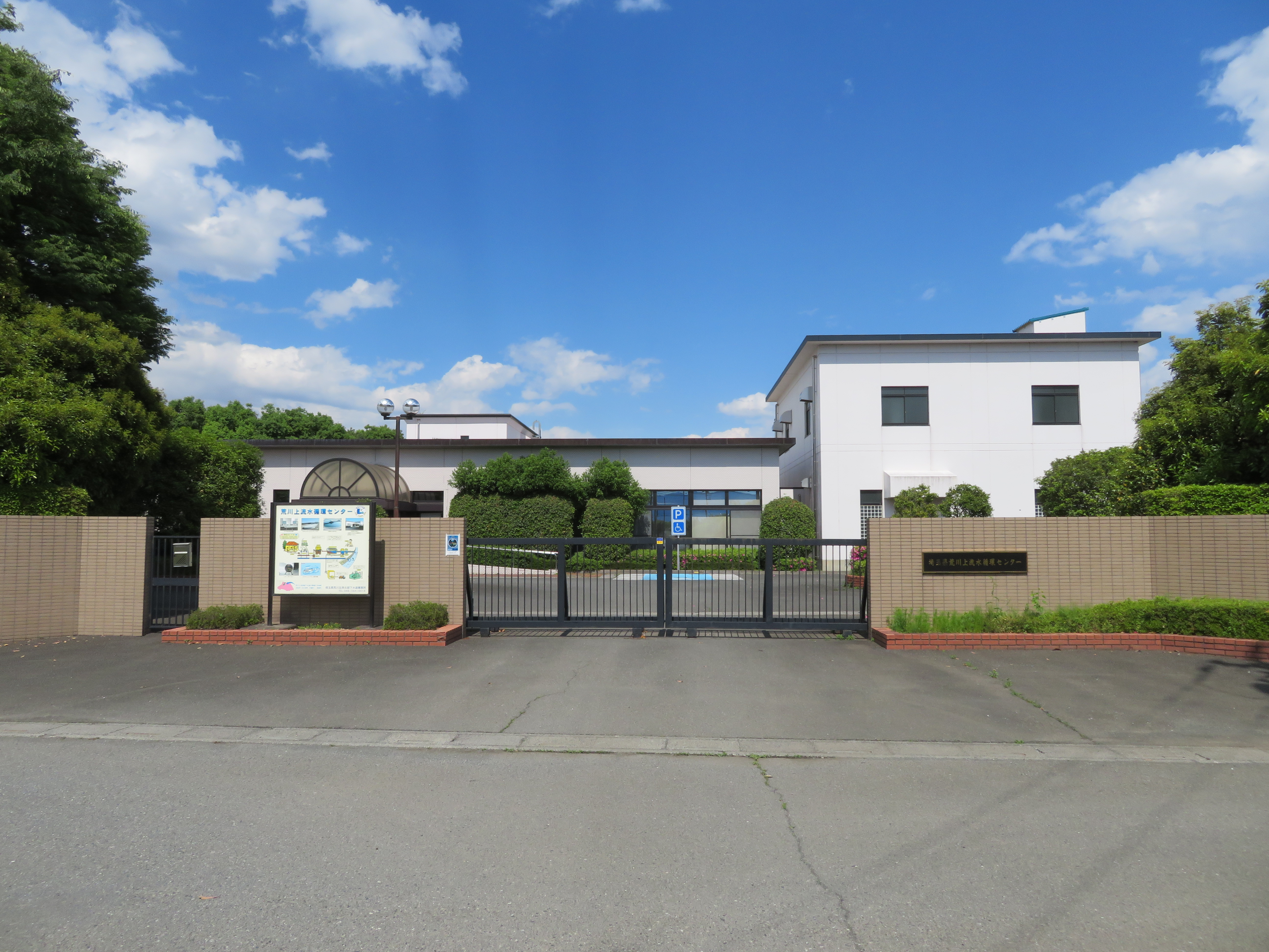 埼玉県荒川上流水循環センター Canon PowerShot SX720 HS